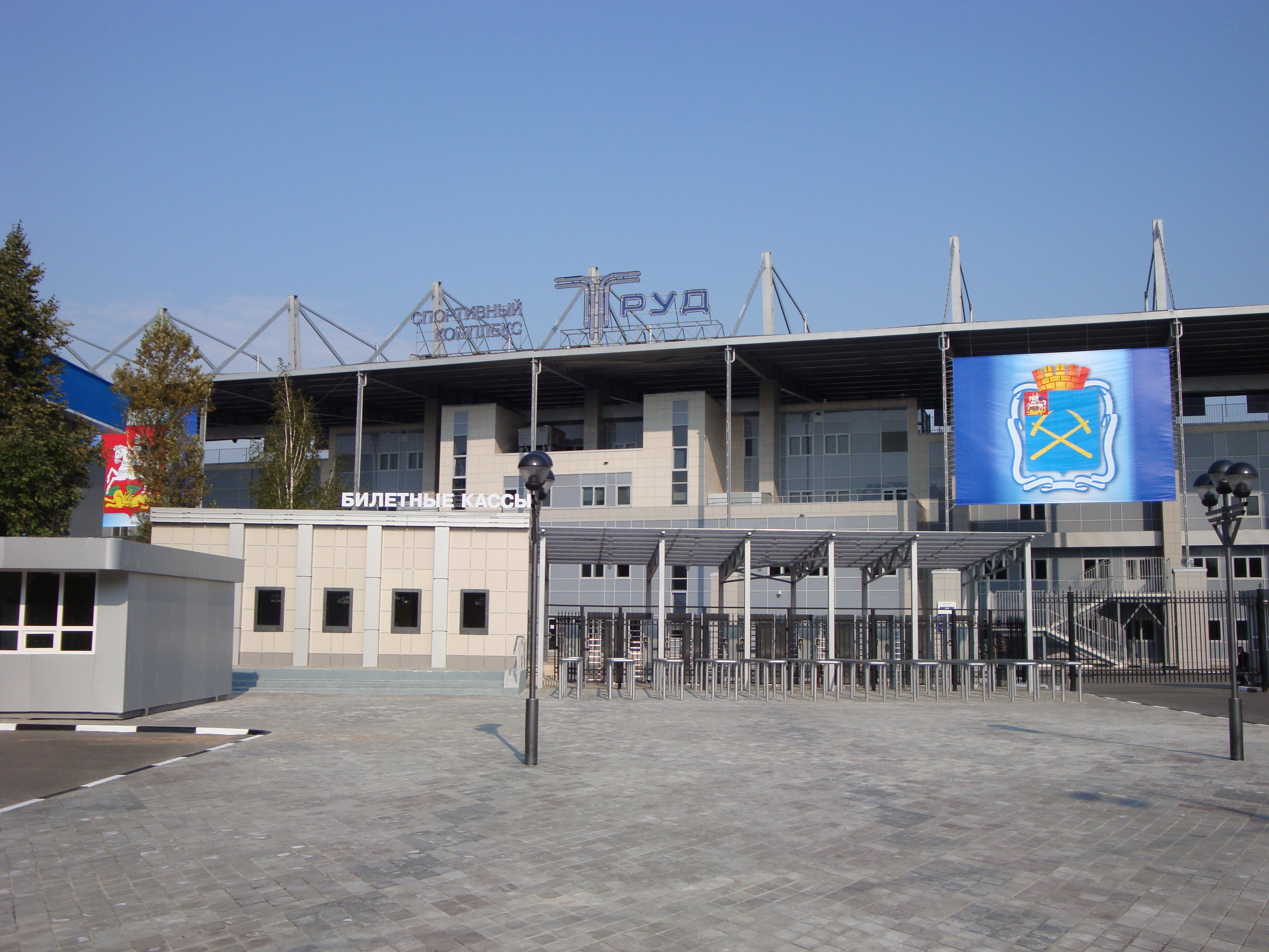 Стадион "Труд" в Подольске (Московская область)